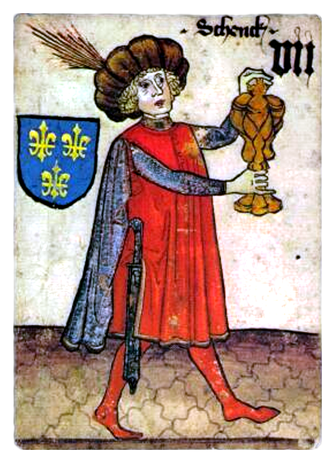 Jeu de cartes Hofämterspiel (France, VII : le porteur de coupe)